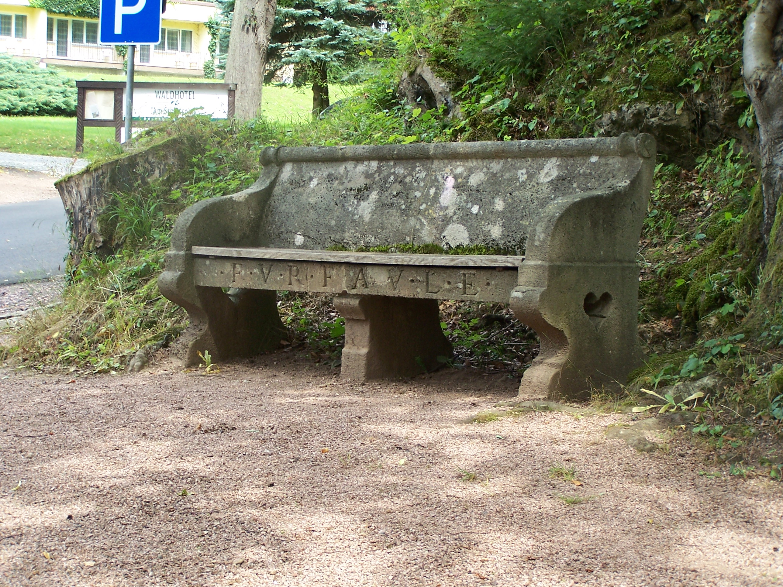 Die legendäre Bank am Eingang des Hofmarstallamtes ist den Untertanen des Meininger Herzogtumes gewidmet.